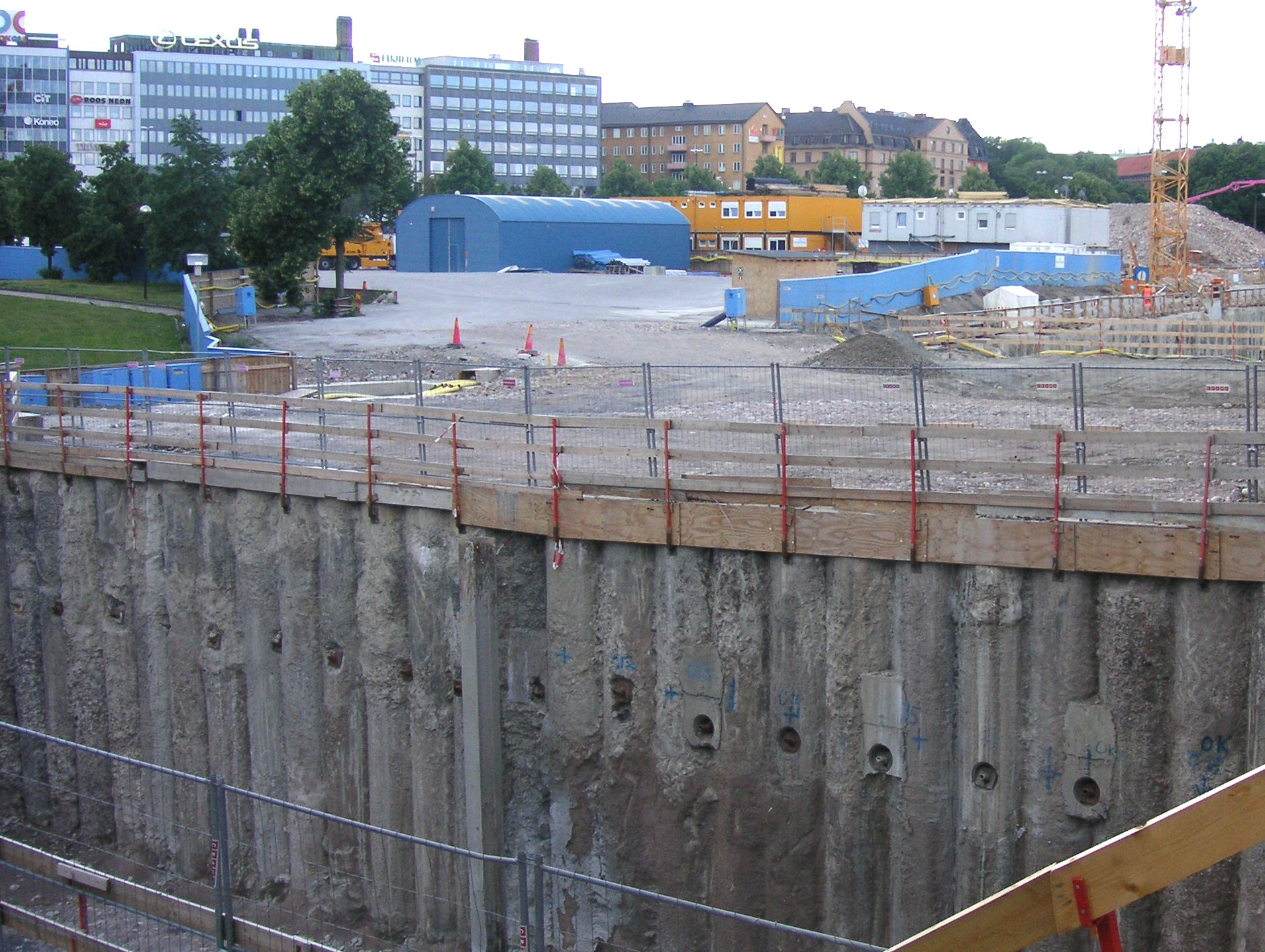 Norra länken, byggarbetsplats i Bellevueparken, Stockholm (spåntvägg av jetpelare)